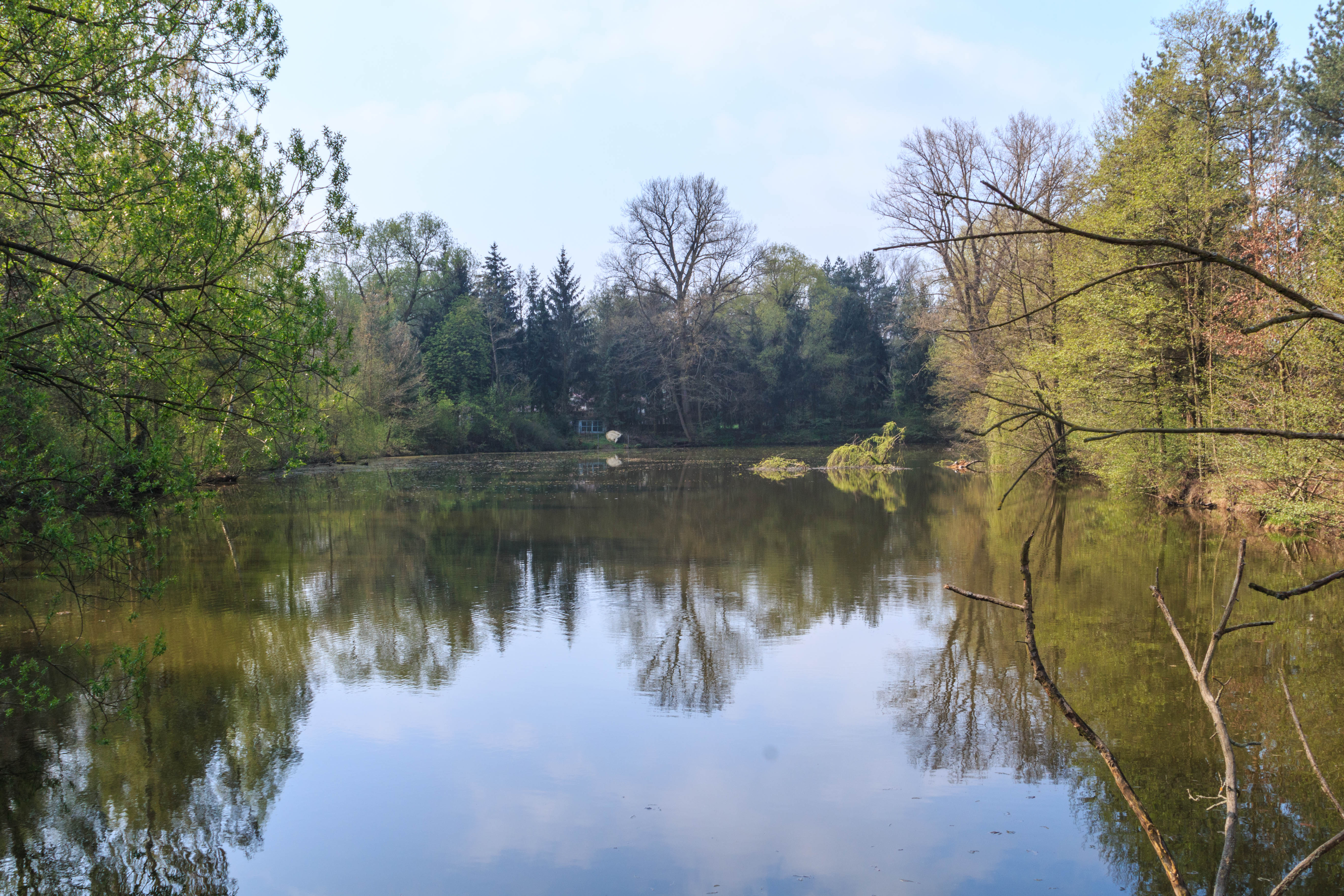 Písník pod panelárnou u Plačic Project: Vodstvo.